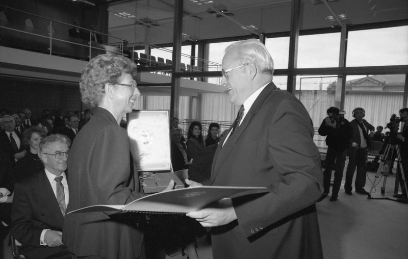 18.12.1989 Festakt anläßlich des Amtswechsel im Bundesverfassungsgericht Karlsruhe. - Amtseinführung von Helga Seibert (Amtszeit ab 10.11.89), und Dr. Jürgen Kühling (ab 12.7.89, beide I. Senat), sowie Klaus Winter (ab 10.11.89, II. Senat). - Verabschiedung der Richter am Bundesverfassungsgericht Prof. Dr. Hermann Heußner (Amtszeit bis 15.6.89) und Dr. Gisela Niemeyer (bis 2.11.89), beide I. Senat, sowie Ernst Träger (bis 2.11.89, II. Senat), denen Bundesverfassungsgericht-Präsident Dr. Roman Herzog das Große Verdienstkreuz mit Stern und Schulterband des Verdienstordens der Bundesrepublik Deutschland aushändigt.